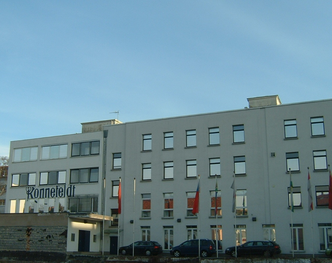 Teehaus Ronnefeldt in Frankfurt-Bockenheim, Kurfürstenplatz 38; gesehen von der Schlossstraße aus